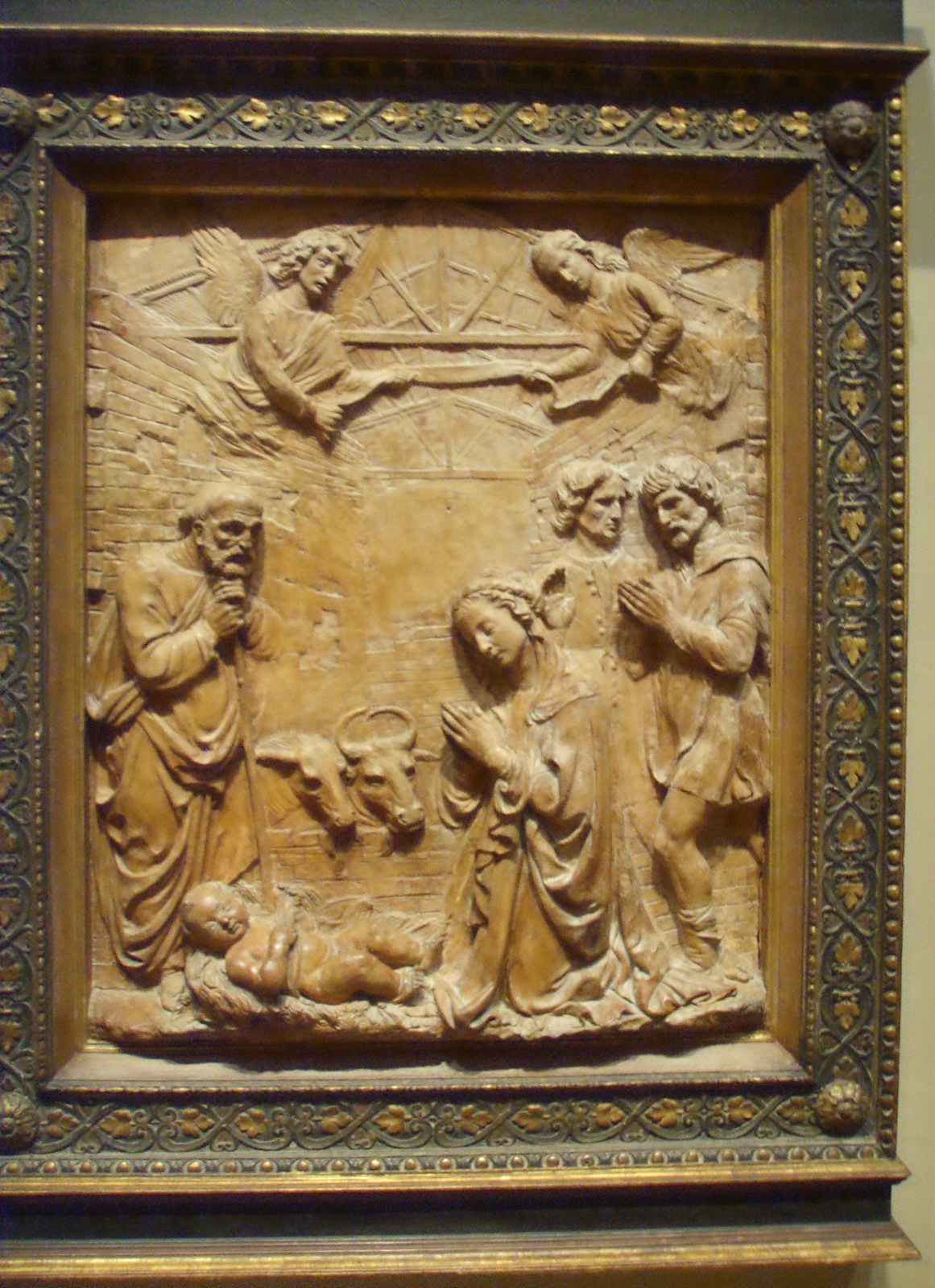 National gallery in washington d.c., francesco di simone ferrucci, adorazione dei pastori 1475-85